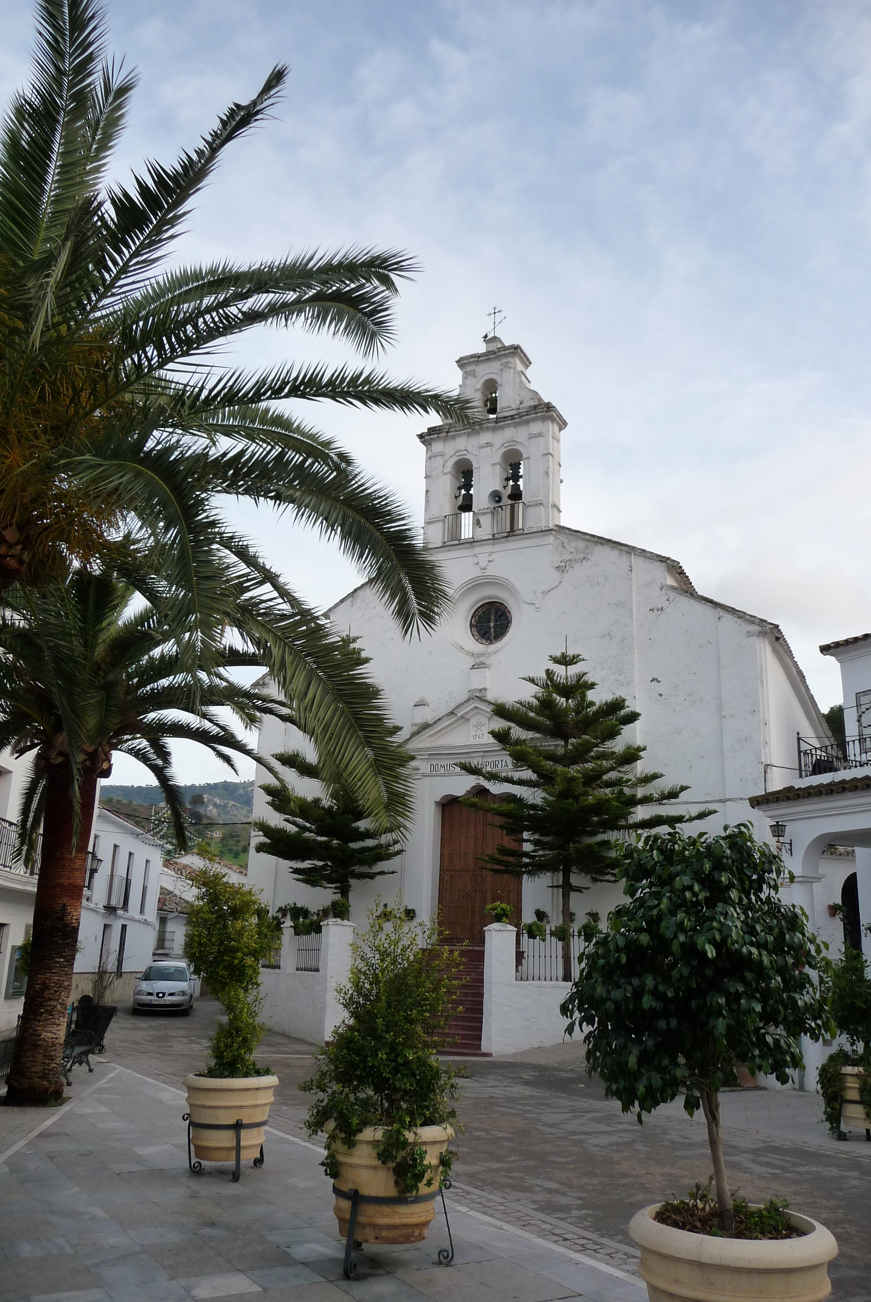 El Gastor (Andalusia, Spain).